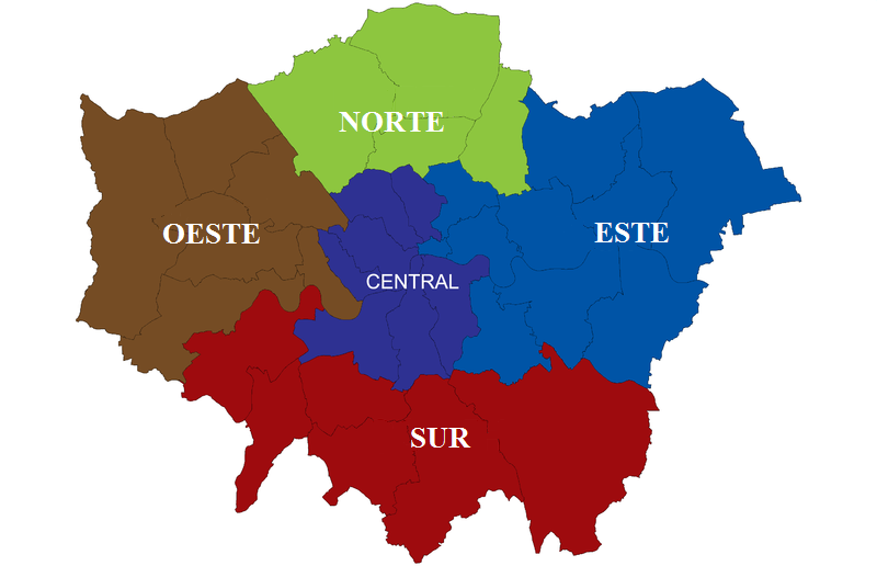 Las subregiones de Londres desde el año 2004. Cada una de estas zonas se divide en varios municipios.